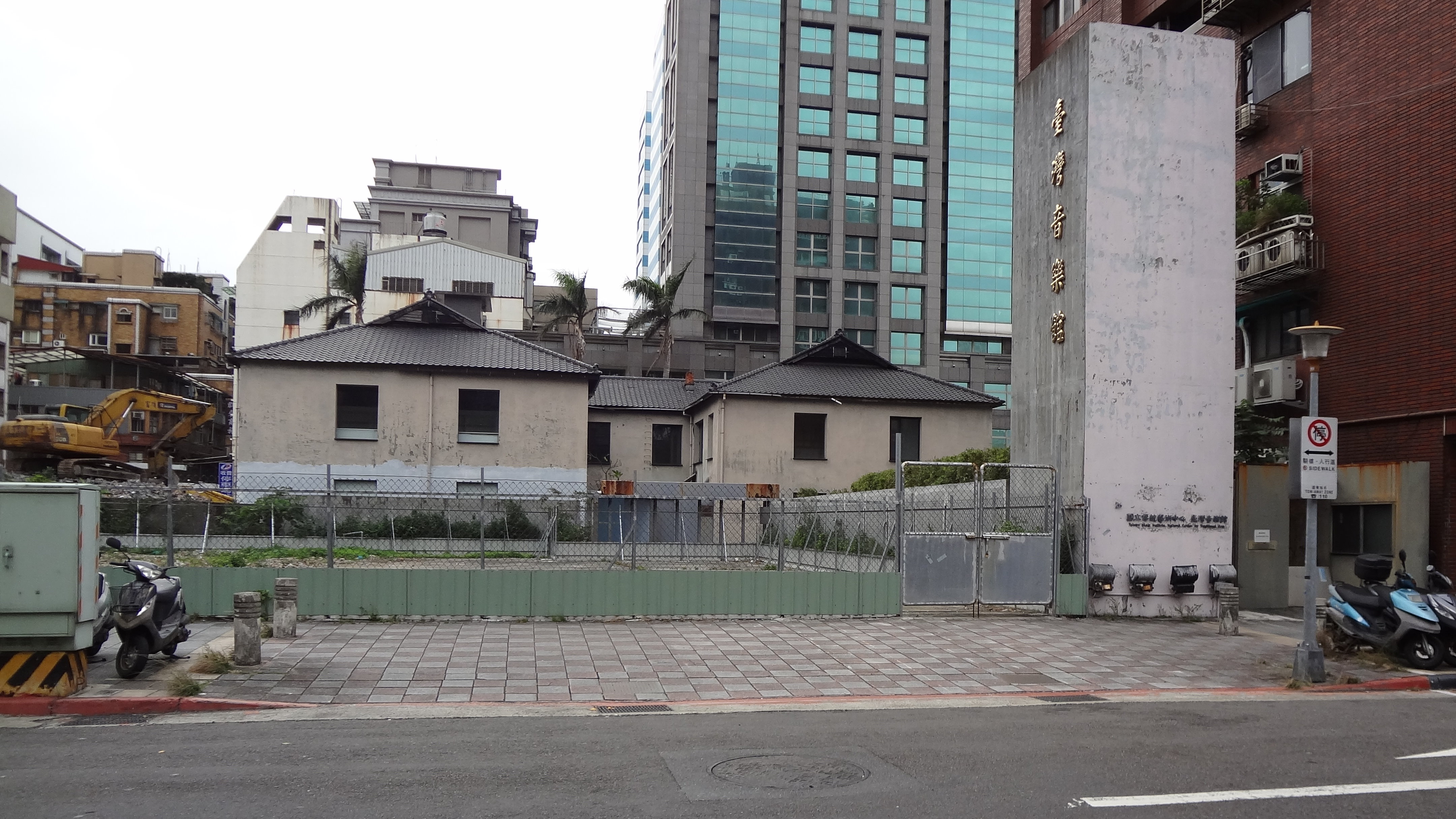 中文（台灣）: 國立傳統藝術中心臺灣音樂館舊址，地址：臺北市中正區杭州北路26號。